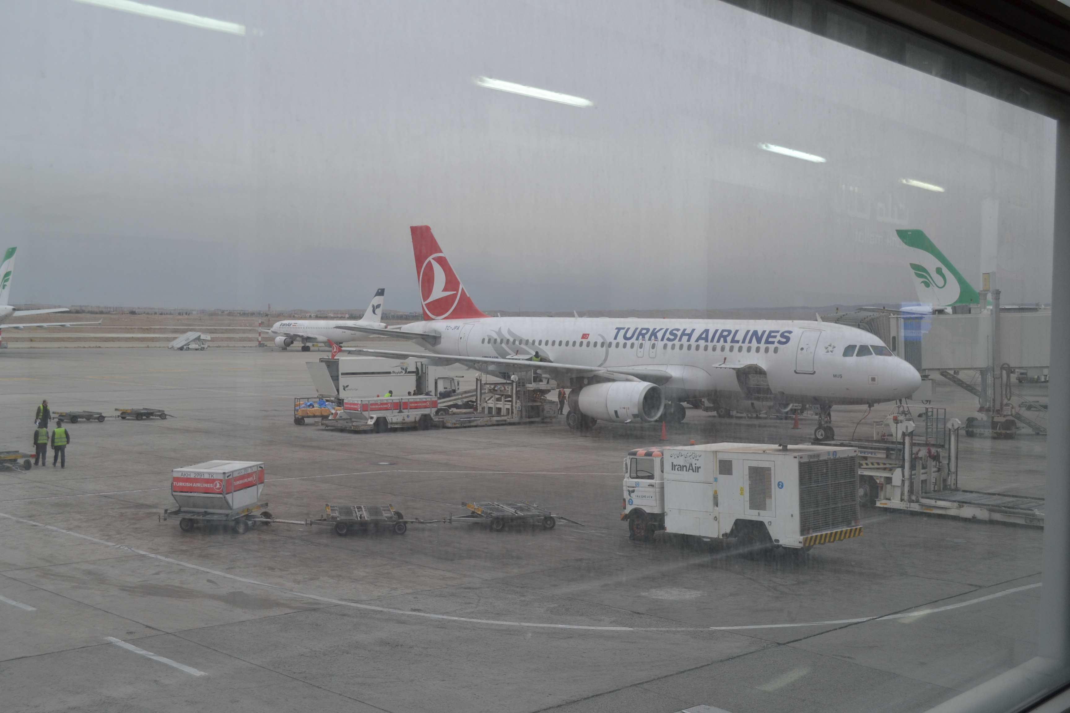 A320 de Turkish Airlines en el Aeropuerto Internacional Imam Khomeini en Teherán, Irán